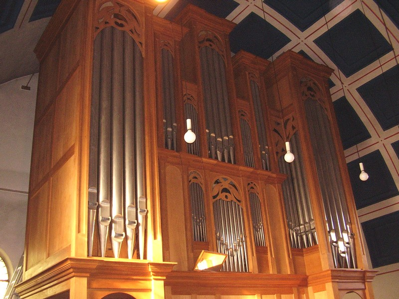 Orgel von St. Augustinus, Nordhorn